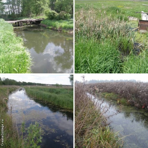 Trubizka drying-wetting system